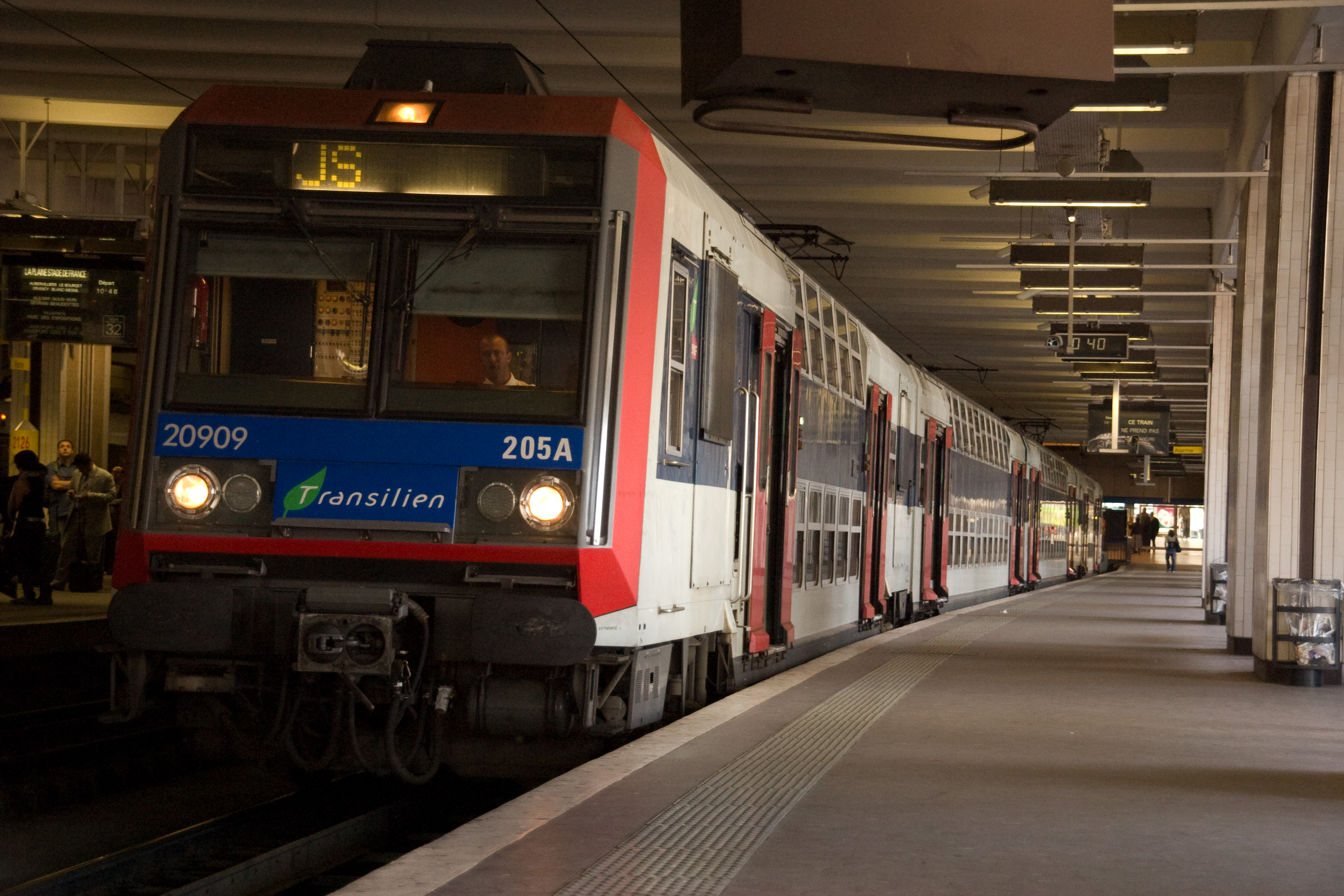 Gare du Nord, Paris, France